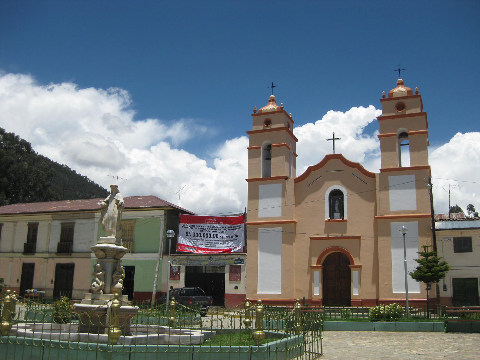 OCOPA 1